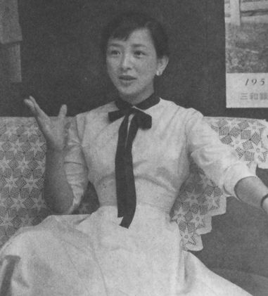 有馬稲子